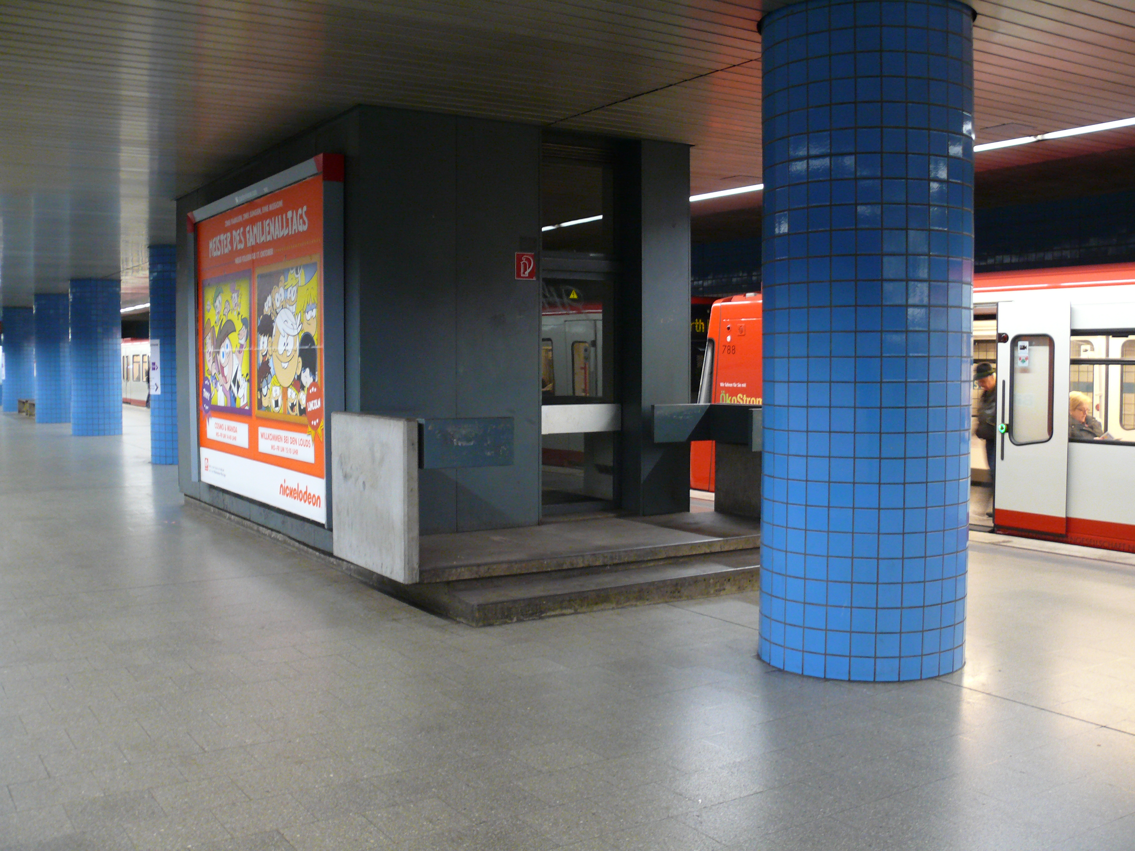 Ehemaliges Abfertigungshäuschen am U-Bahnhof Frankenstraße in Nürnberg.